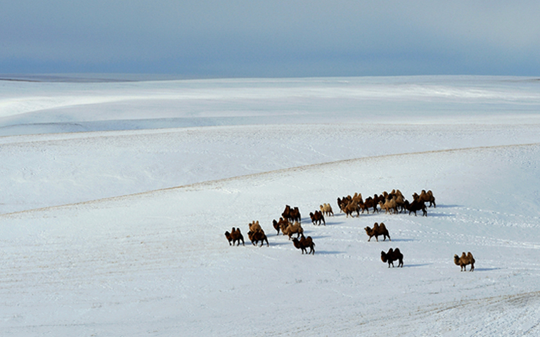 鄂温克西博山上的骆驼队